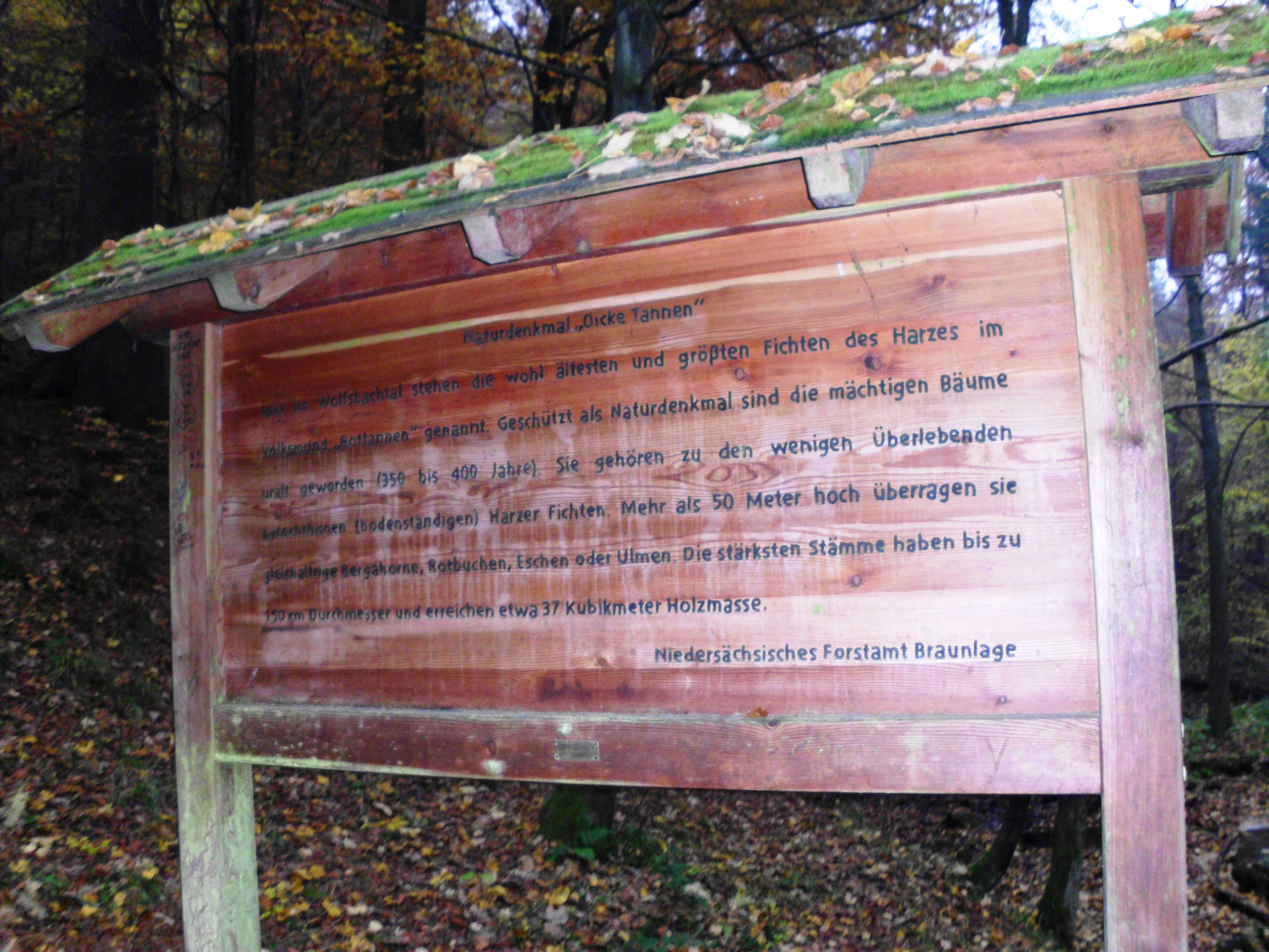 Information zum Flächennaturdenkmal Dicke Tannen bei Braunlage-Hohegeiß